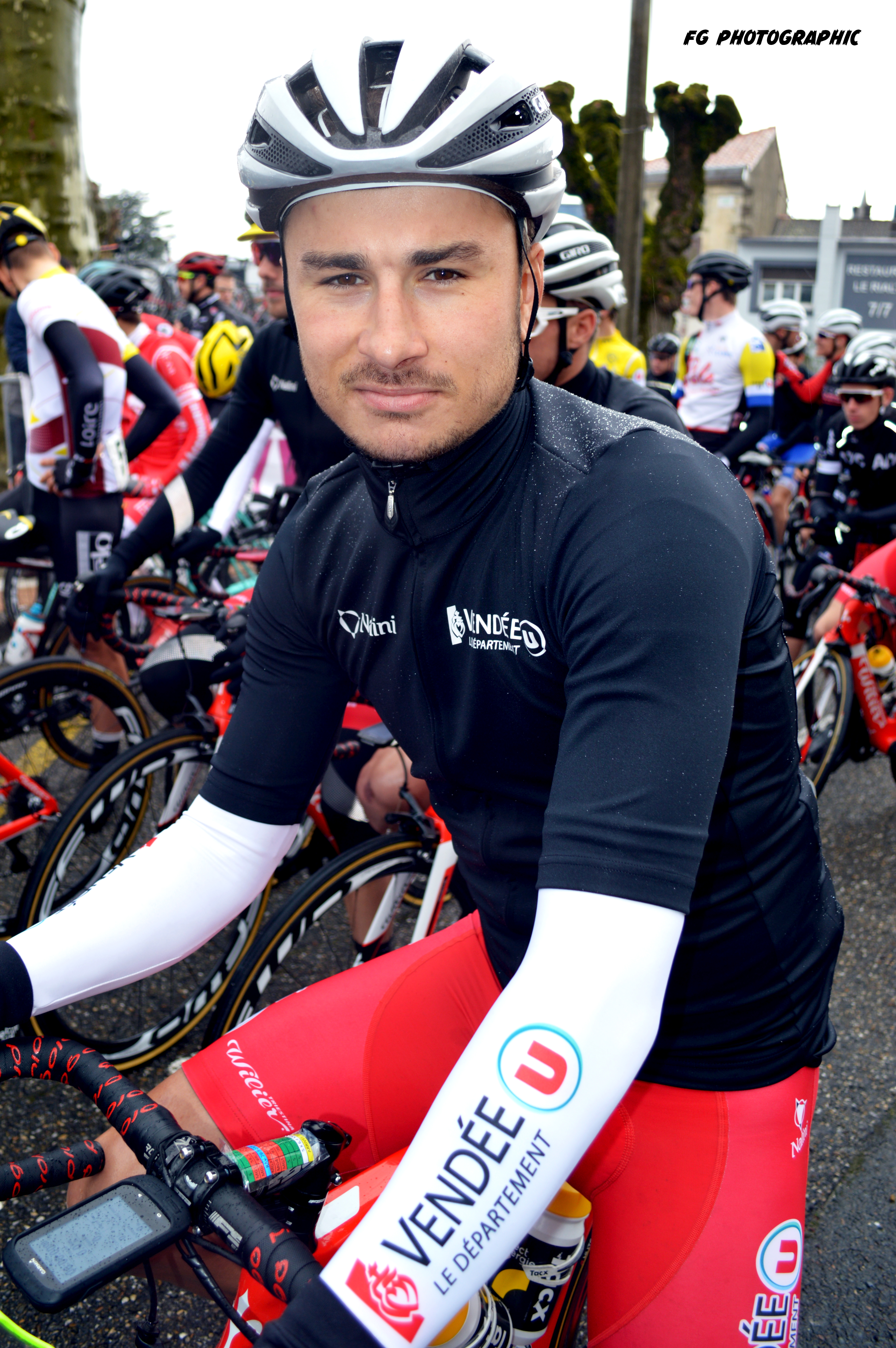 Clément ORCEAU (portrait mars 2019)